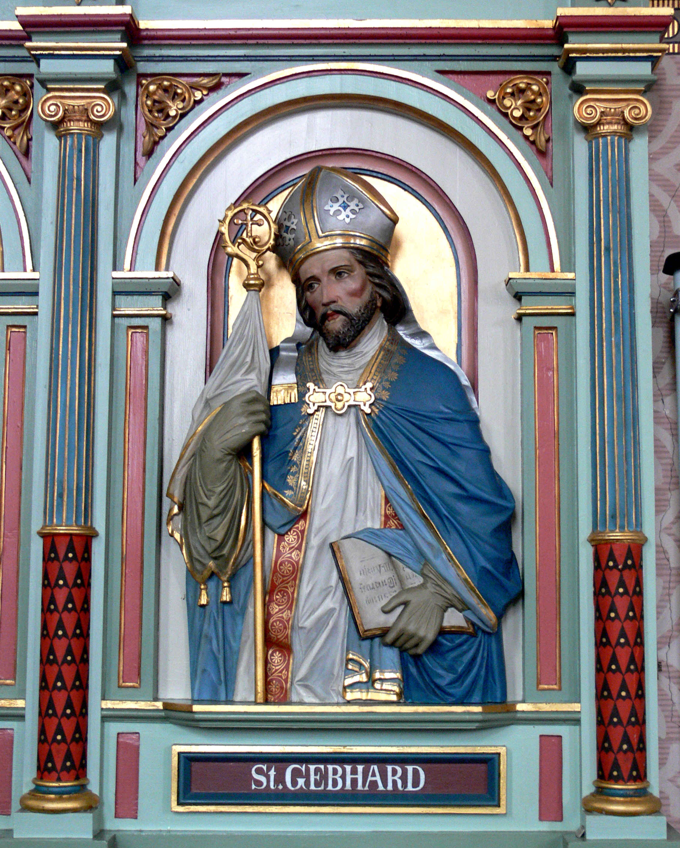 Kath. Pfarrkirche St. Gordian und Epimachus, Merazhofen, Stadt Leutkirch im Allgäu, Landkreis Ravensburg Chorgestühl, 1896, Bildhauer: Peter Paul Metz Hl. Gebhard von Konstanz